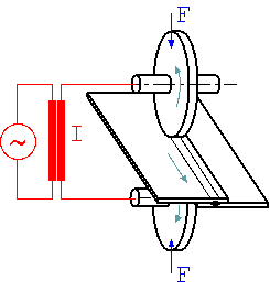 Widerstandsschweißen - Prinzipskizze Rollennahtschweißen